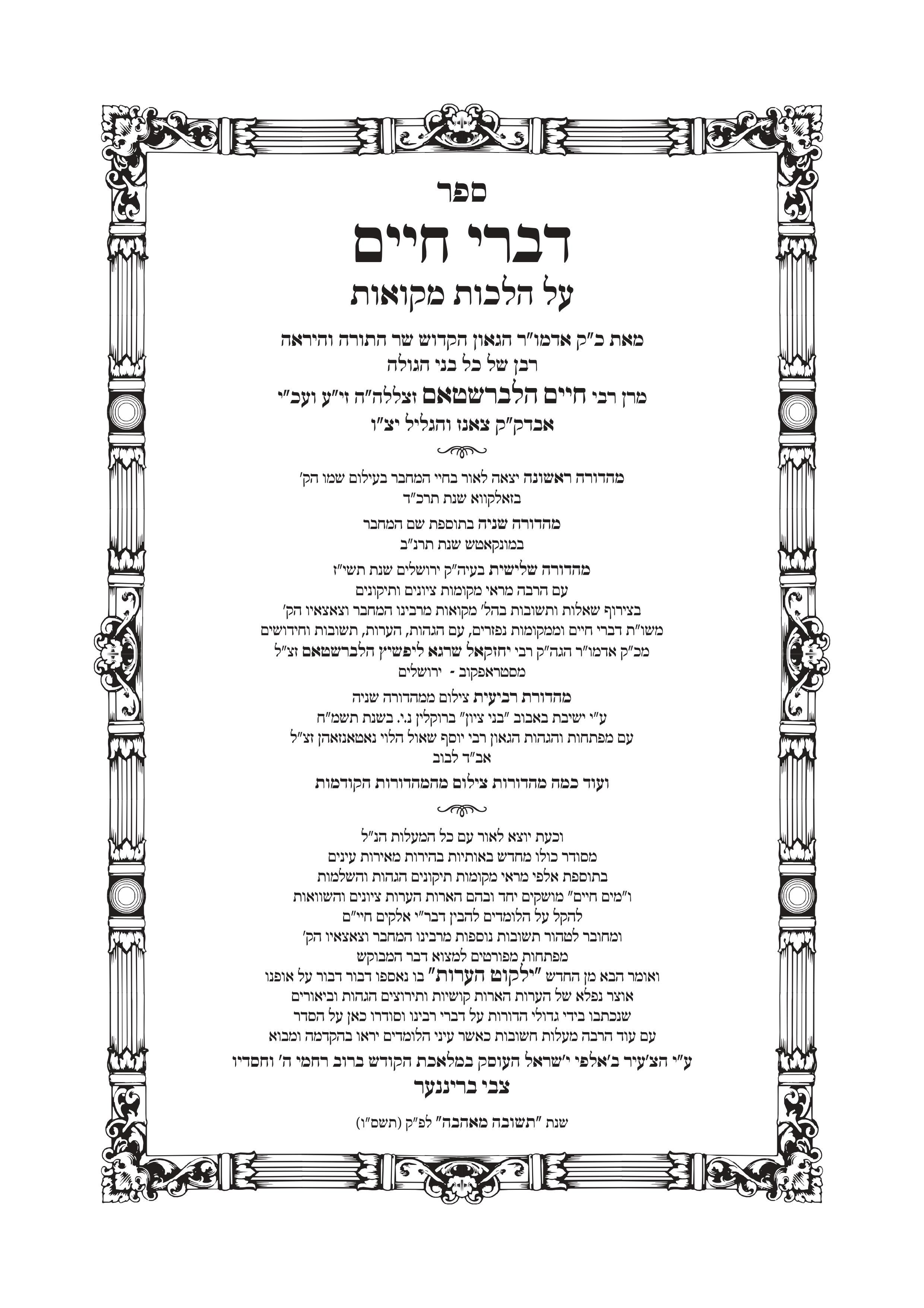 שער הספר דברי חיים מקואות